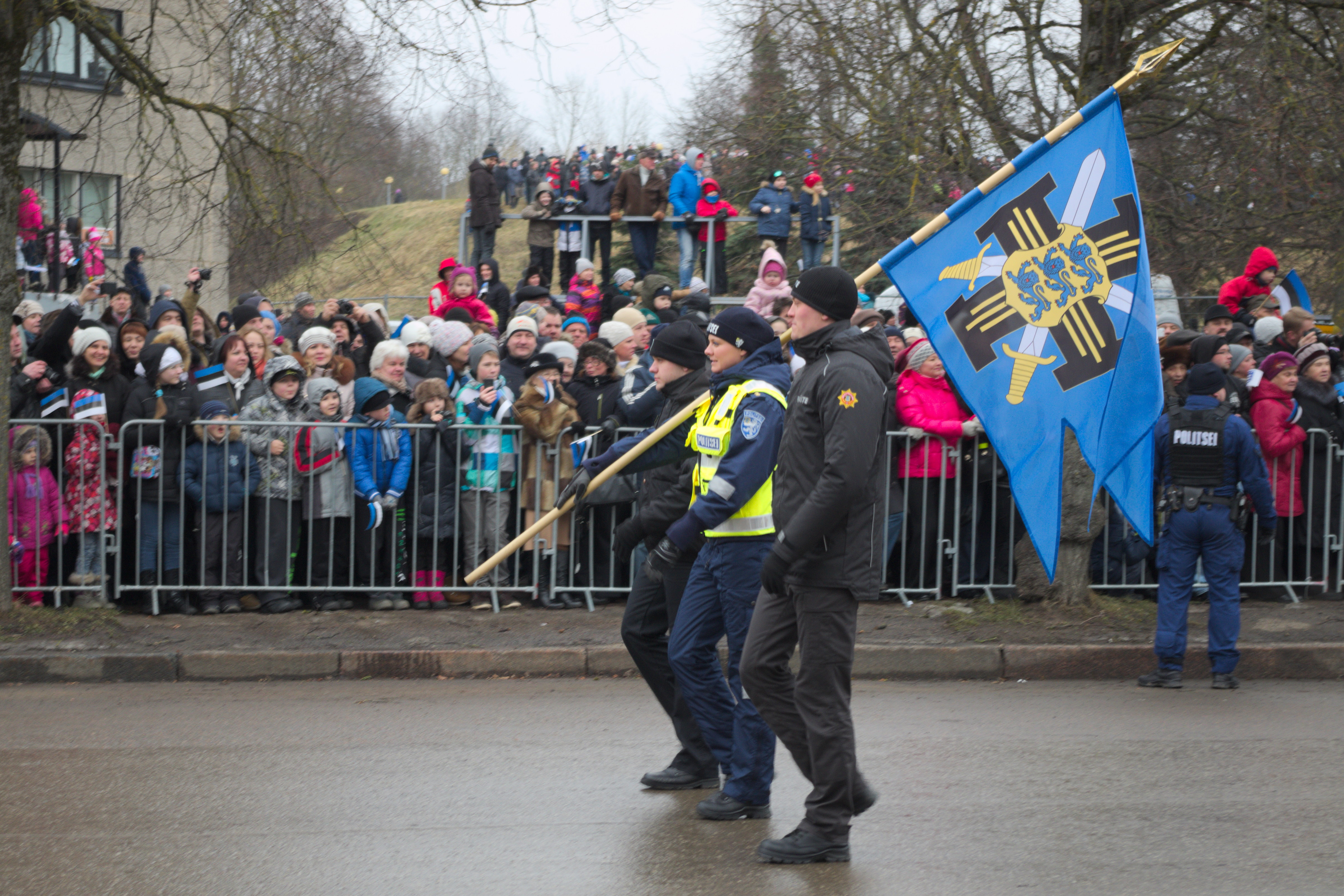 Sisekaitseakadeemia lippurid Vabariigi aastapäeva paraadil Narvas, 2015